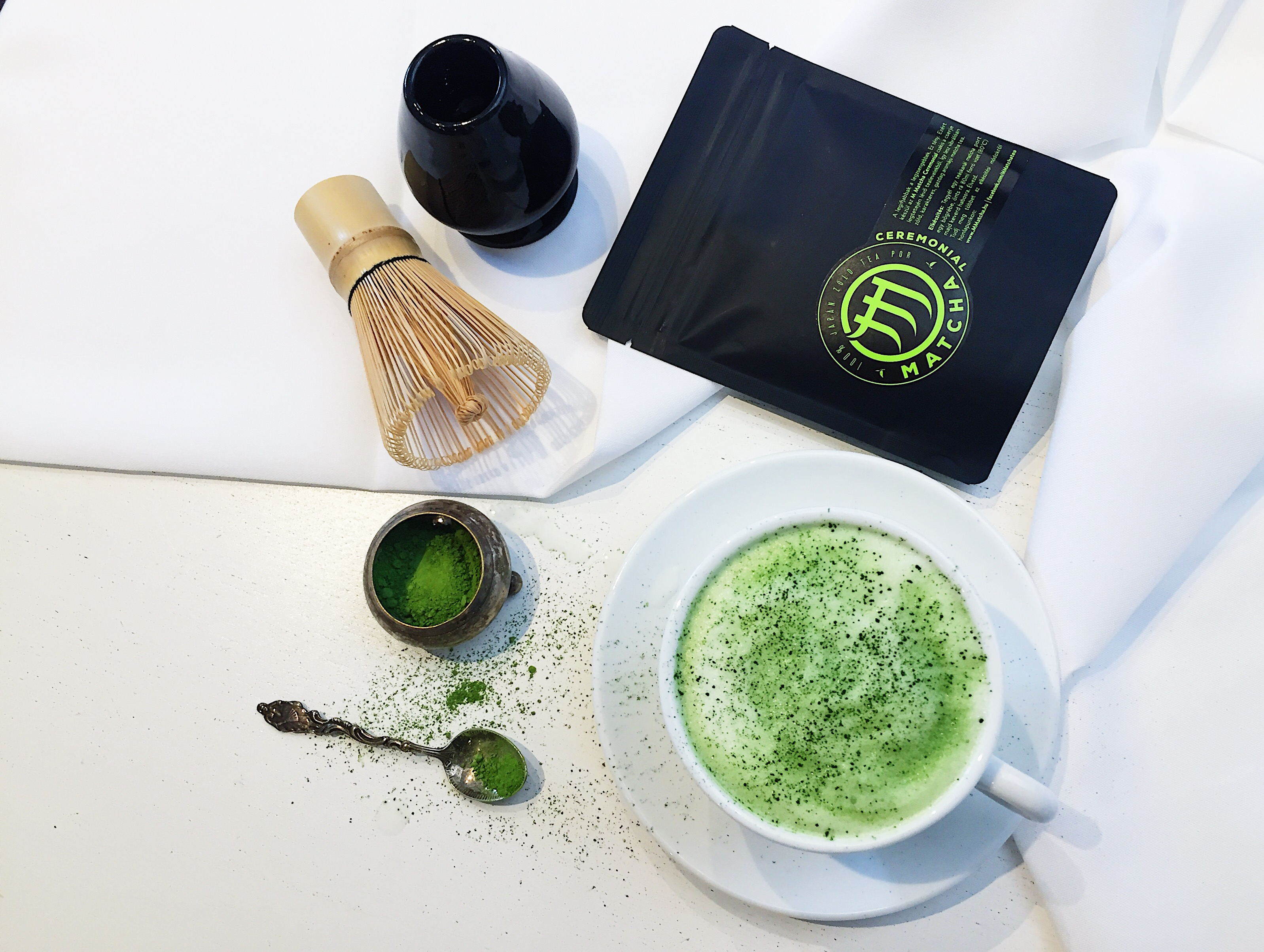 matcha (porrá őrölt zöld tea) latte